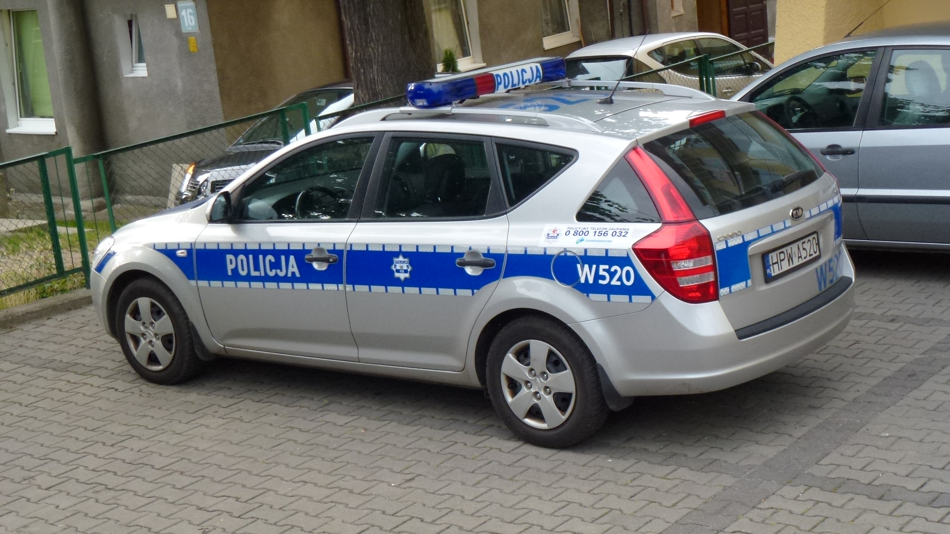 Radiowóz Policyjny przy Komendzie w Międzyzdrojach woj. zachodniopomorskie, pow kamieński